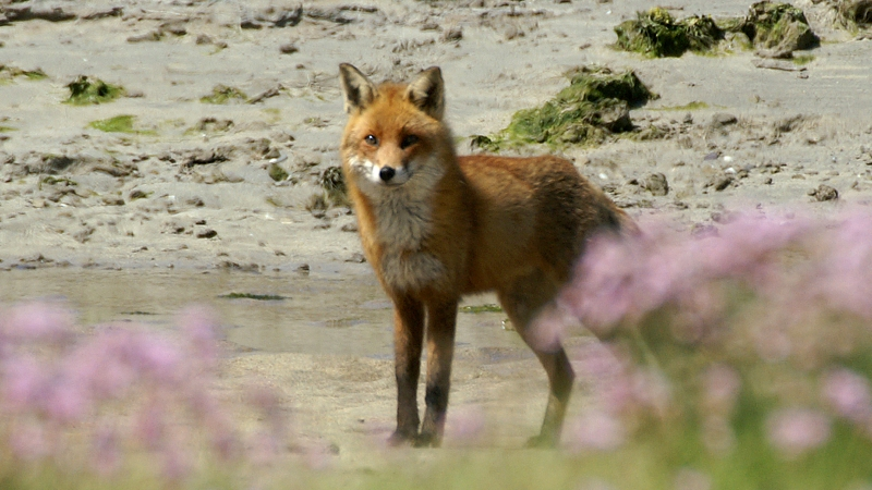 Red Fox (Vulpes vulpes)